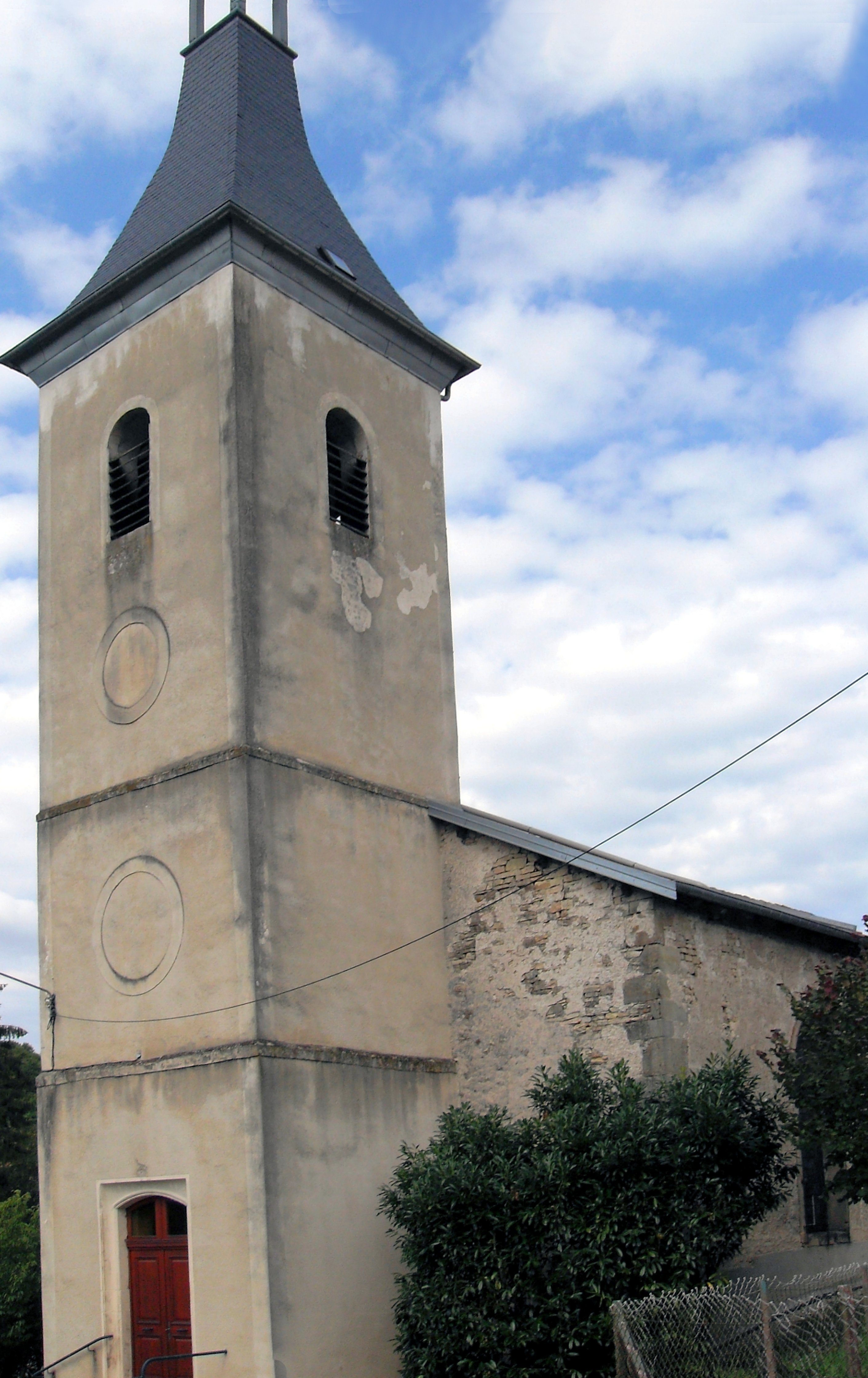 L'église Saint-Martin à Gircourt-lès-Viéville